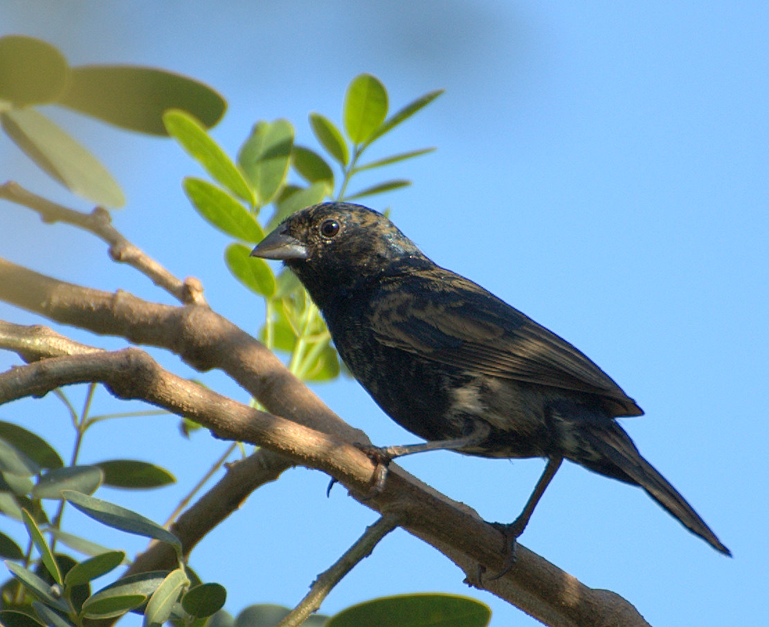 TIZIU, Blue-black Grassquit, Volatinia jacarina, "Fazenda do Estado" localizada no município de Manduri-SP